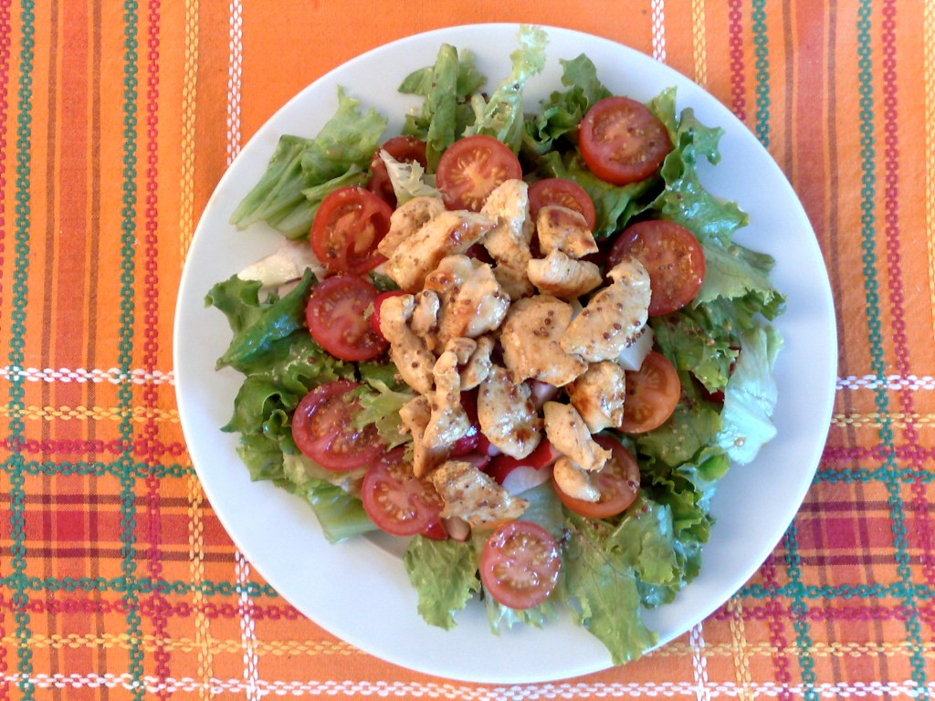 amanida amb pollastre - 1